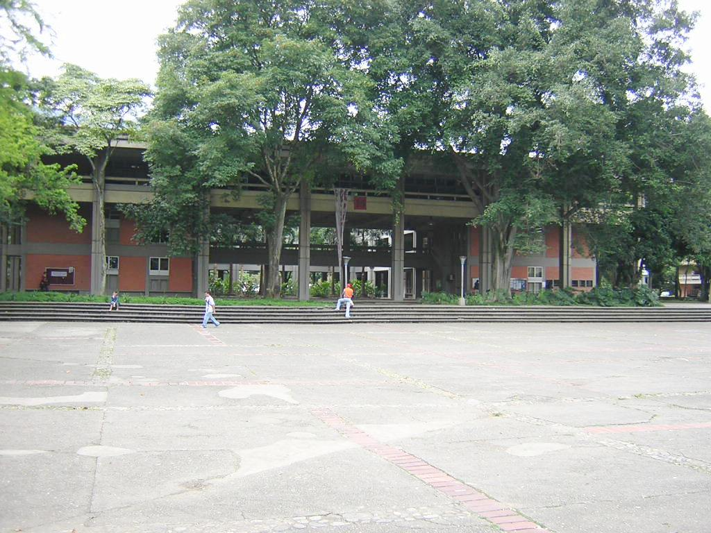 Edificio Administrativo (bloque 16), Universidad de Antioquia, Medellín, Colombia (esta foto la tome yo, y la libero al dominio público)